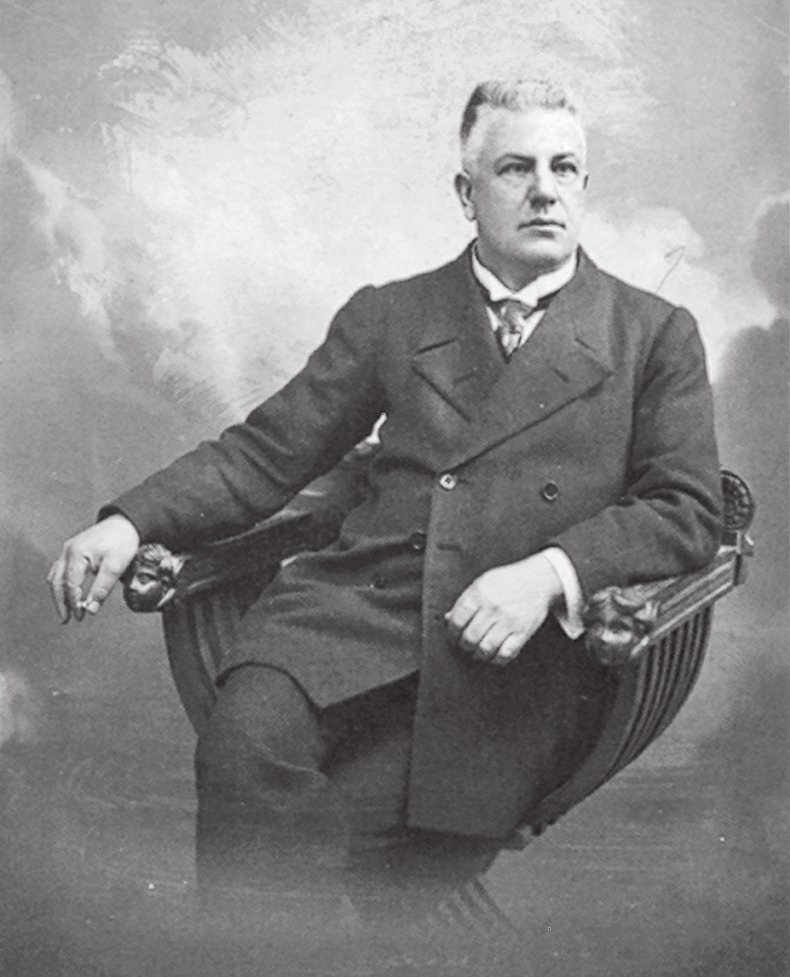 Arturo Malignani in un ritratto dello studio Pignat (Udine, Civici musei, Fototeca).